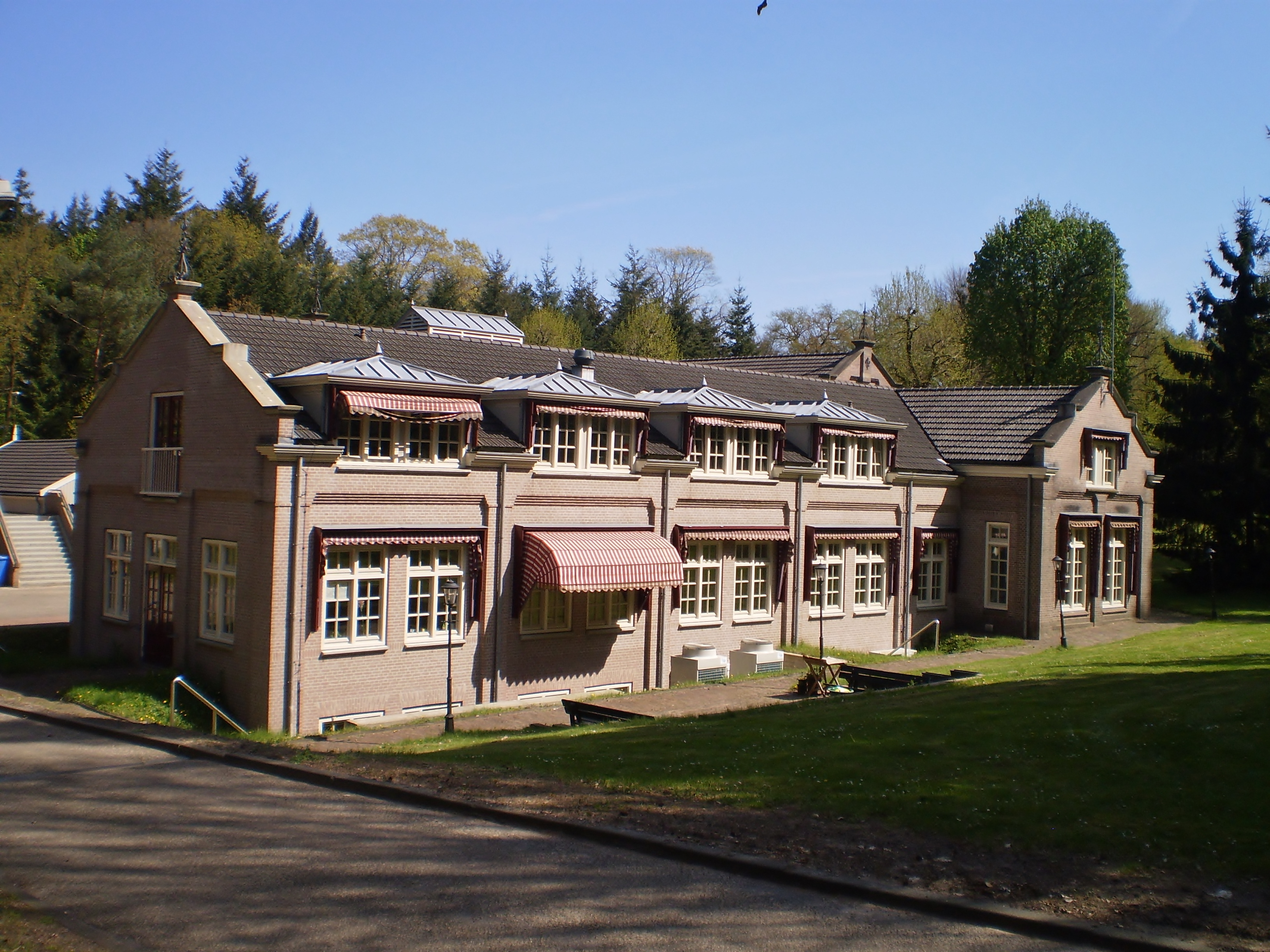 Waterpompstation zuidzijde